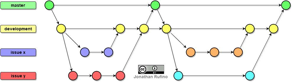 Estrutura de Branchs do GitHub